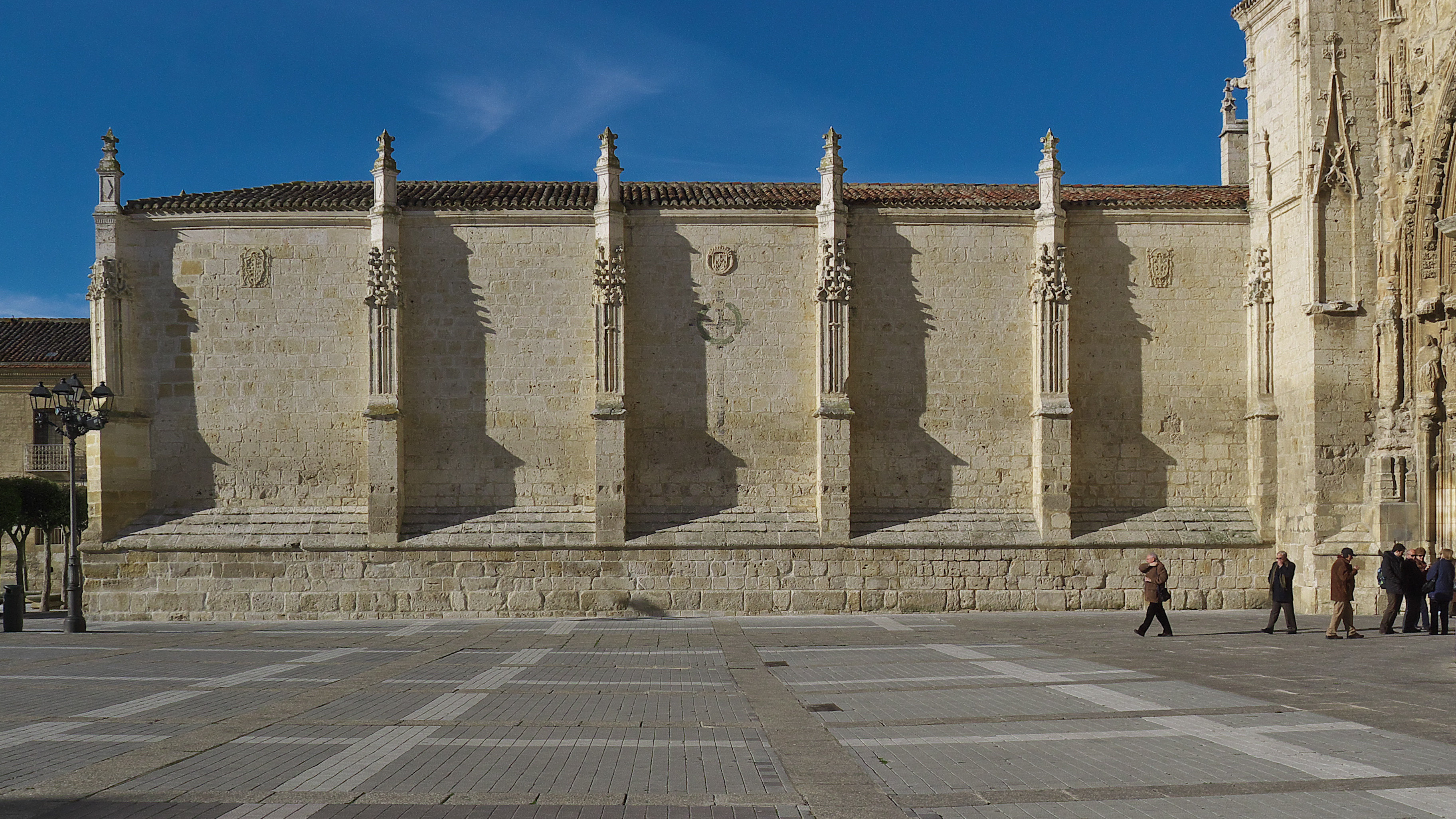 Muro exterior del claustro con los contrafuertes de Juan Gil de Hontañón